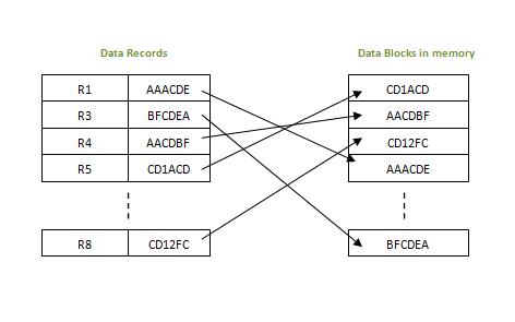 Монгол: Индекслэсэн хандалт